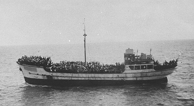 אוניית המעפילים משמר העמק